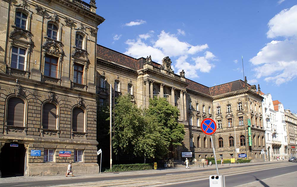 Dawny Sejm Śląski ob. NOT Piłsudskiego 74, Miasto Wrocław - Stare Miasto